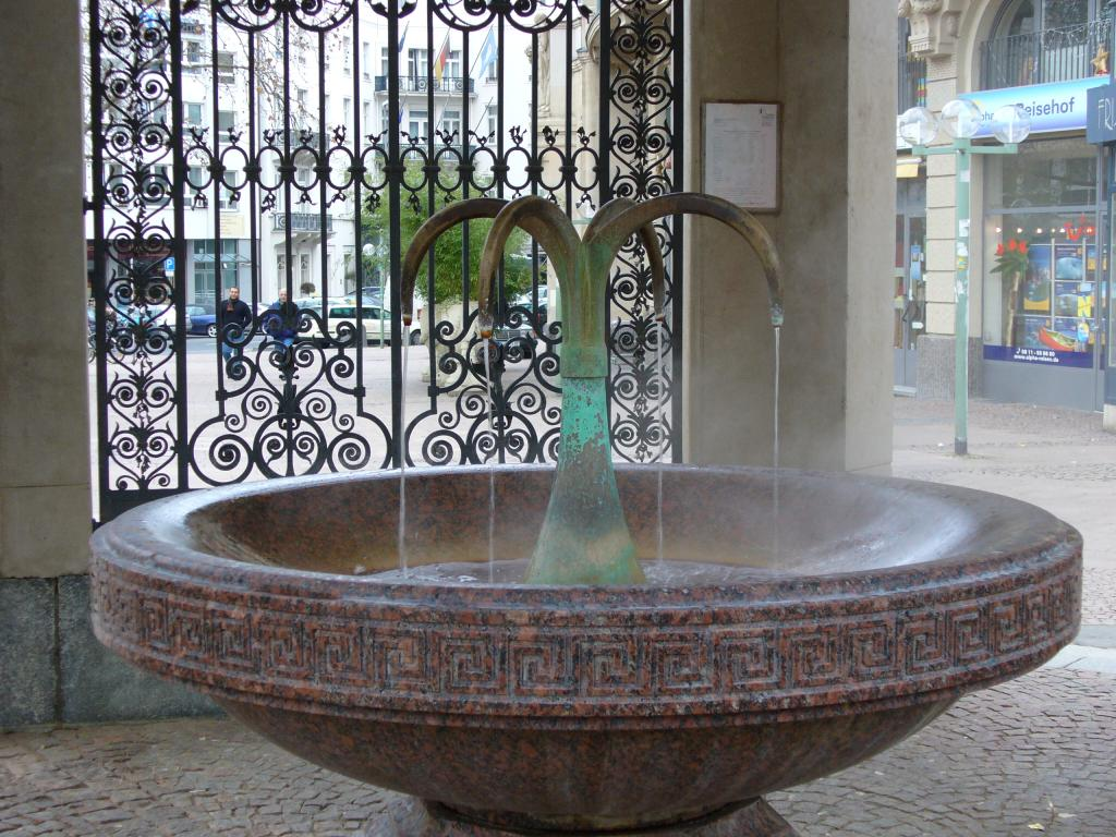 Kochbrunnen (hot well) in Wiesbaden, Germany